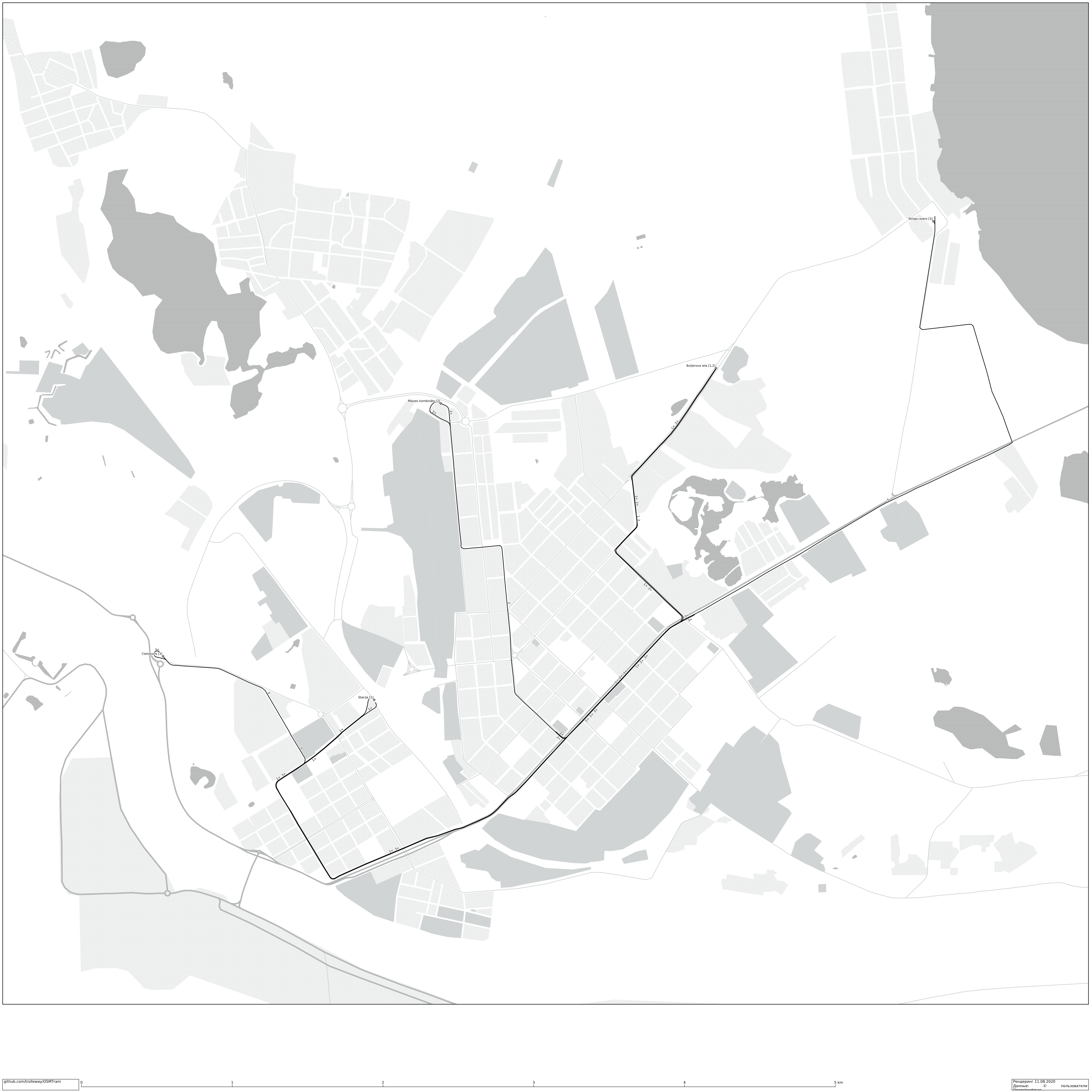 Daugavpils tram map